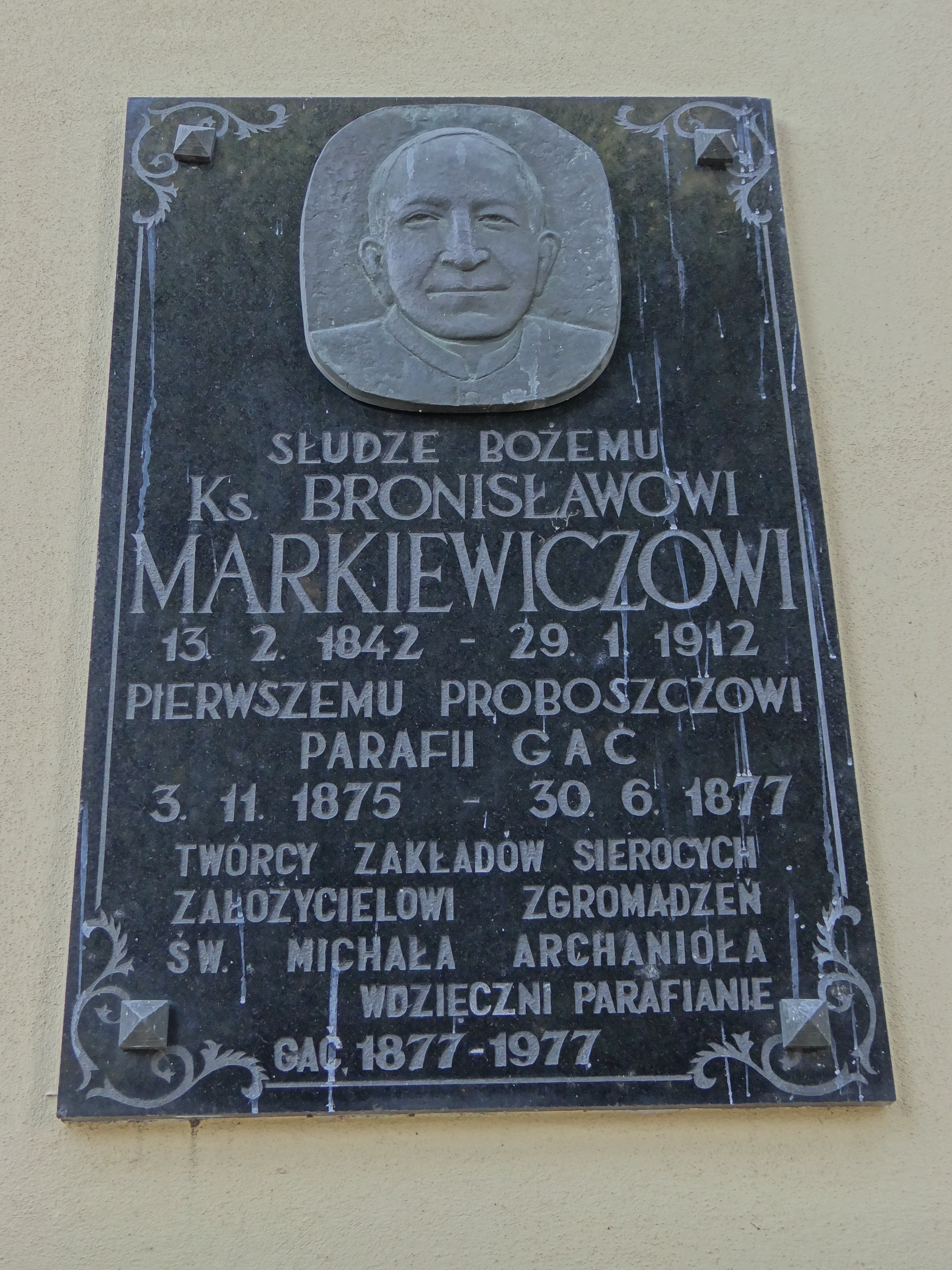 Gać, kościół par. p.w. Wniebowzięcia NMP, 1893-1894